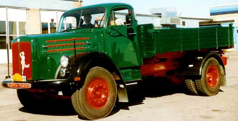 Scania-Vabis L71 Regent Truck